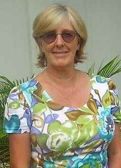 Constâncio Pinto, Minister für Handel, Industrie und Umwelt Osttimors